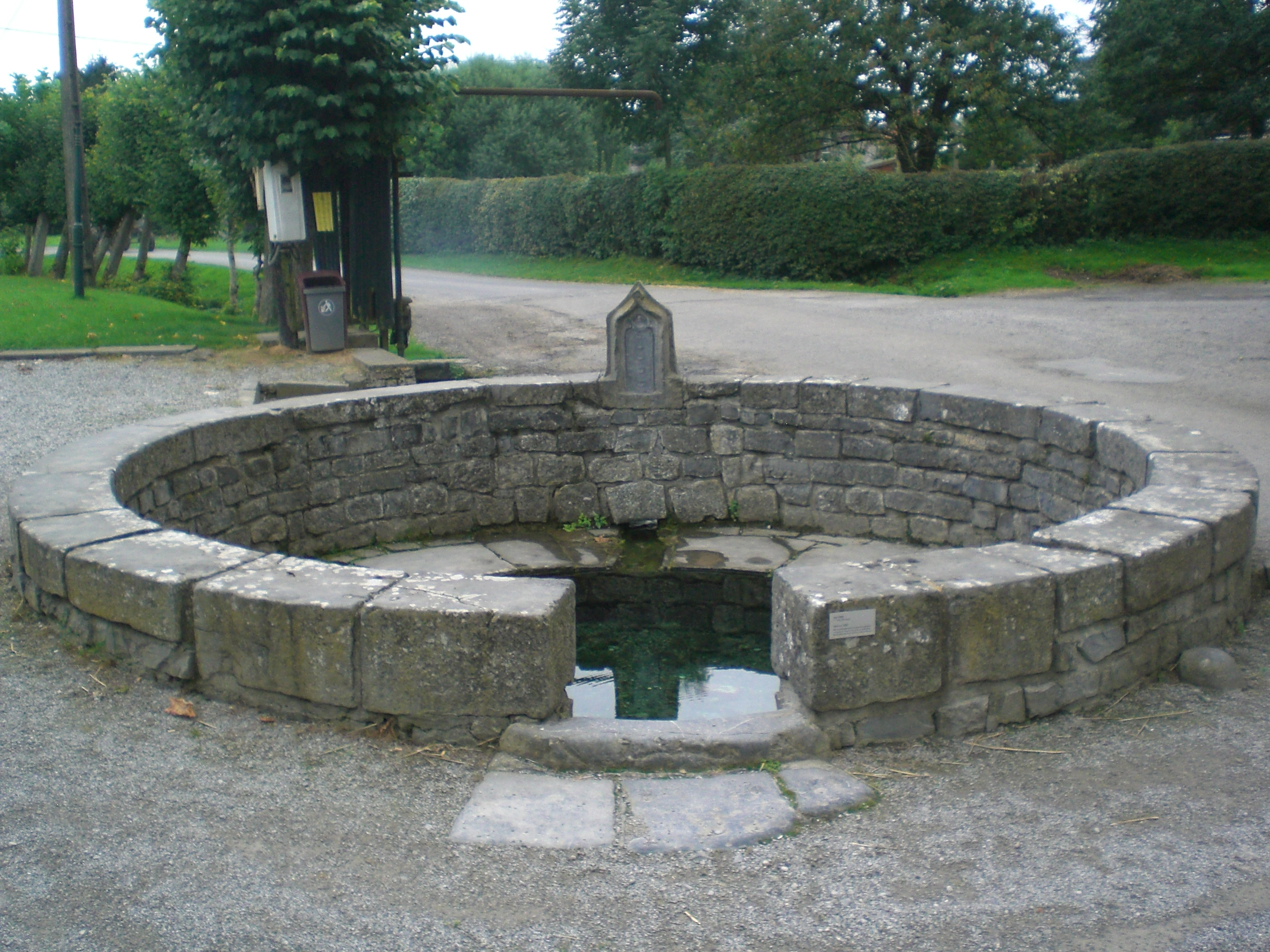 fontaine st eloi de floursies